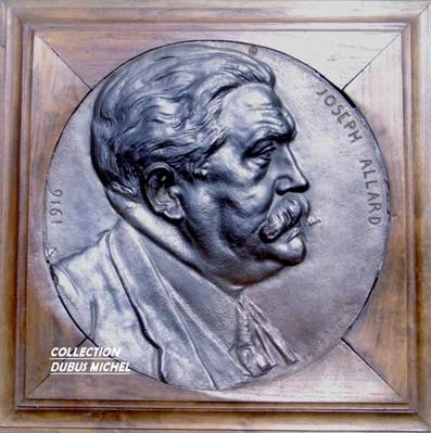 Pièce à l'effigie de Joseph Allard